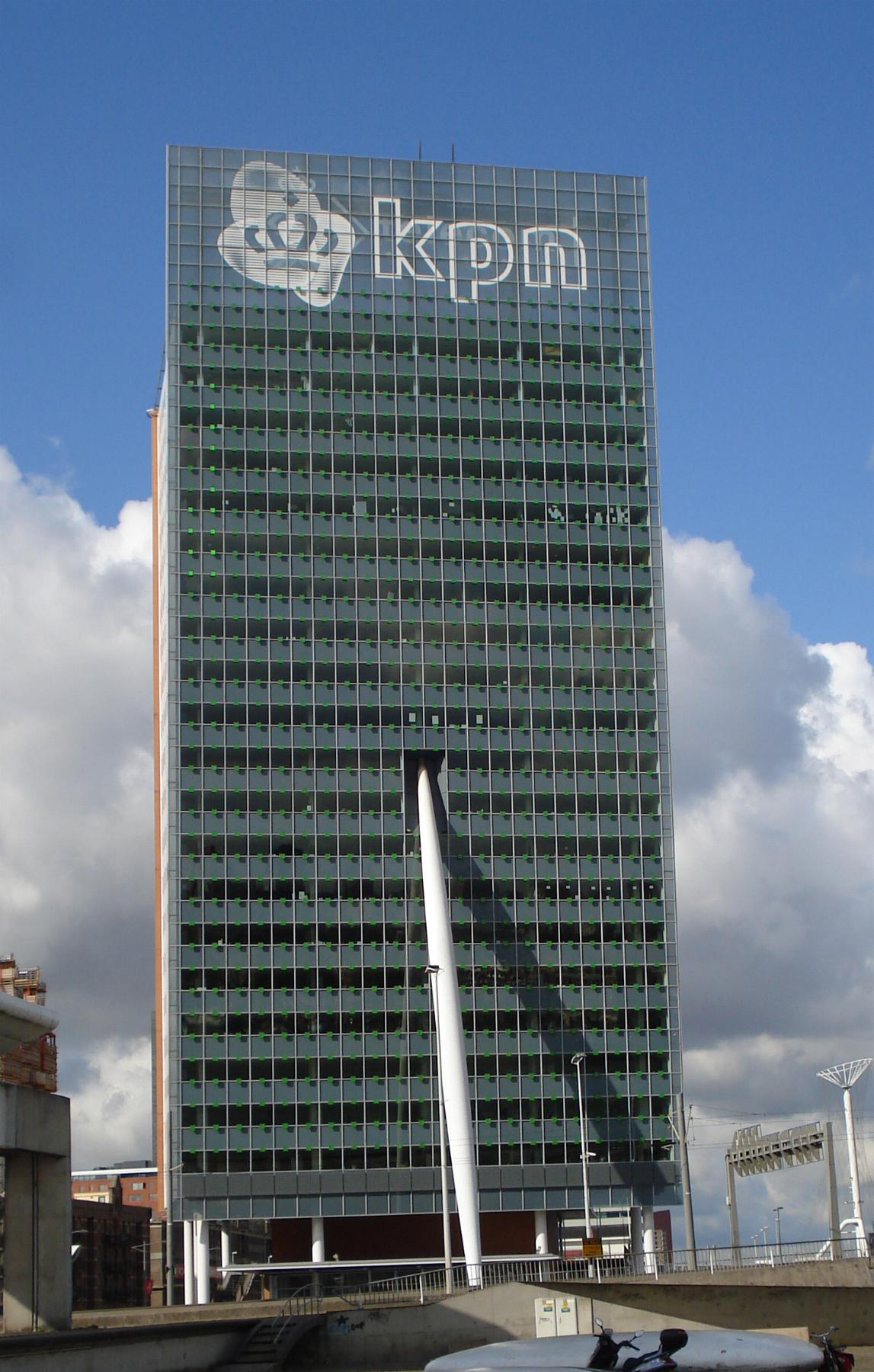 Rotterdam, Kop van Zuid. KPN gebouw.